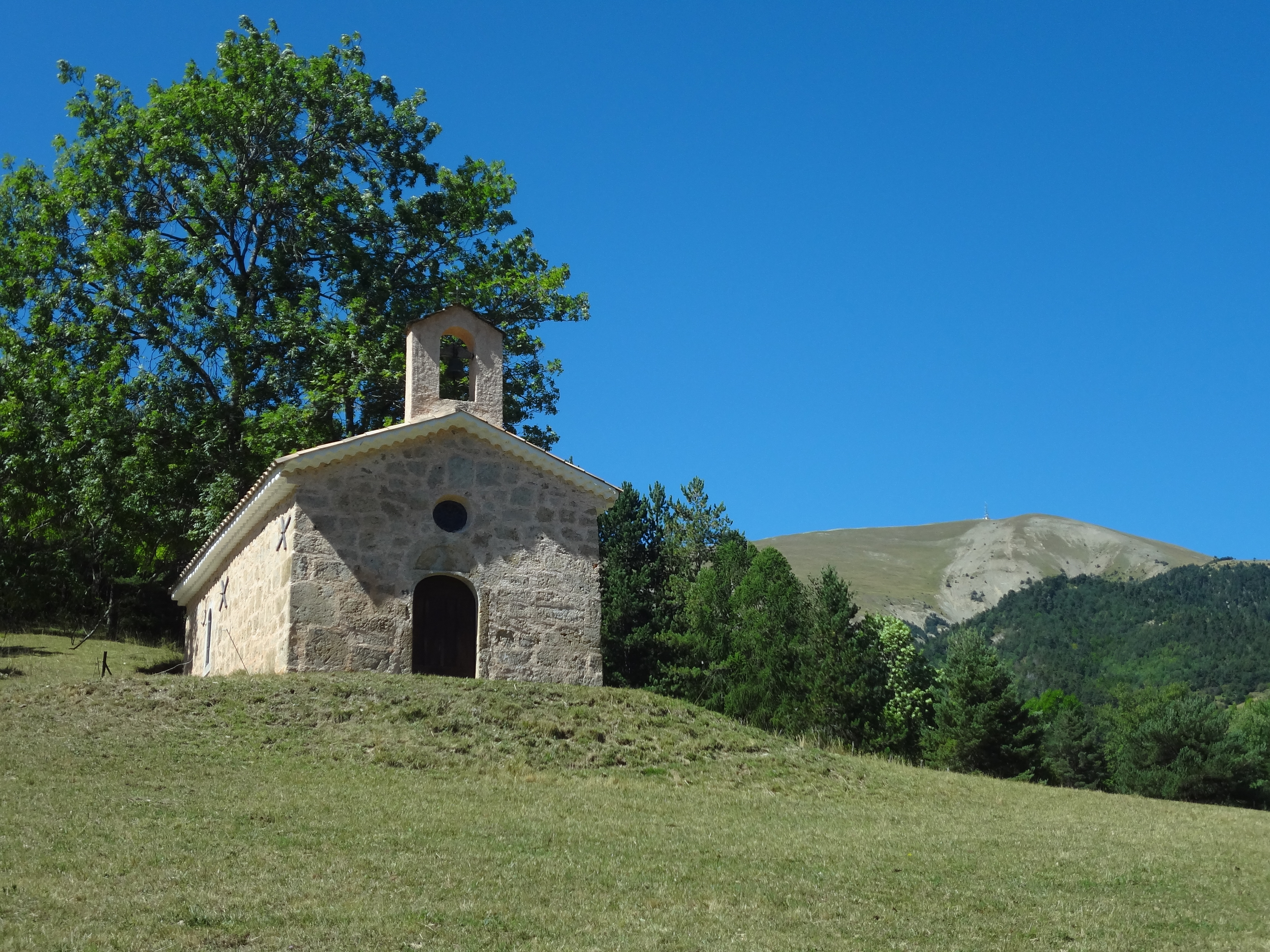 chapelle Sainte-Anne du Labouret, hameau du Labouret, à Beaujeu, Alpes-de-Haute-Provence (France). Située à 1060 m d'altitude, elle surplombe la route départementale 900 (ancienne route nationale 100). En arrière-plan, le Blayeul ou sommet des Quatre Termes (2189 m).